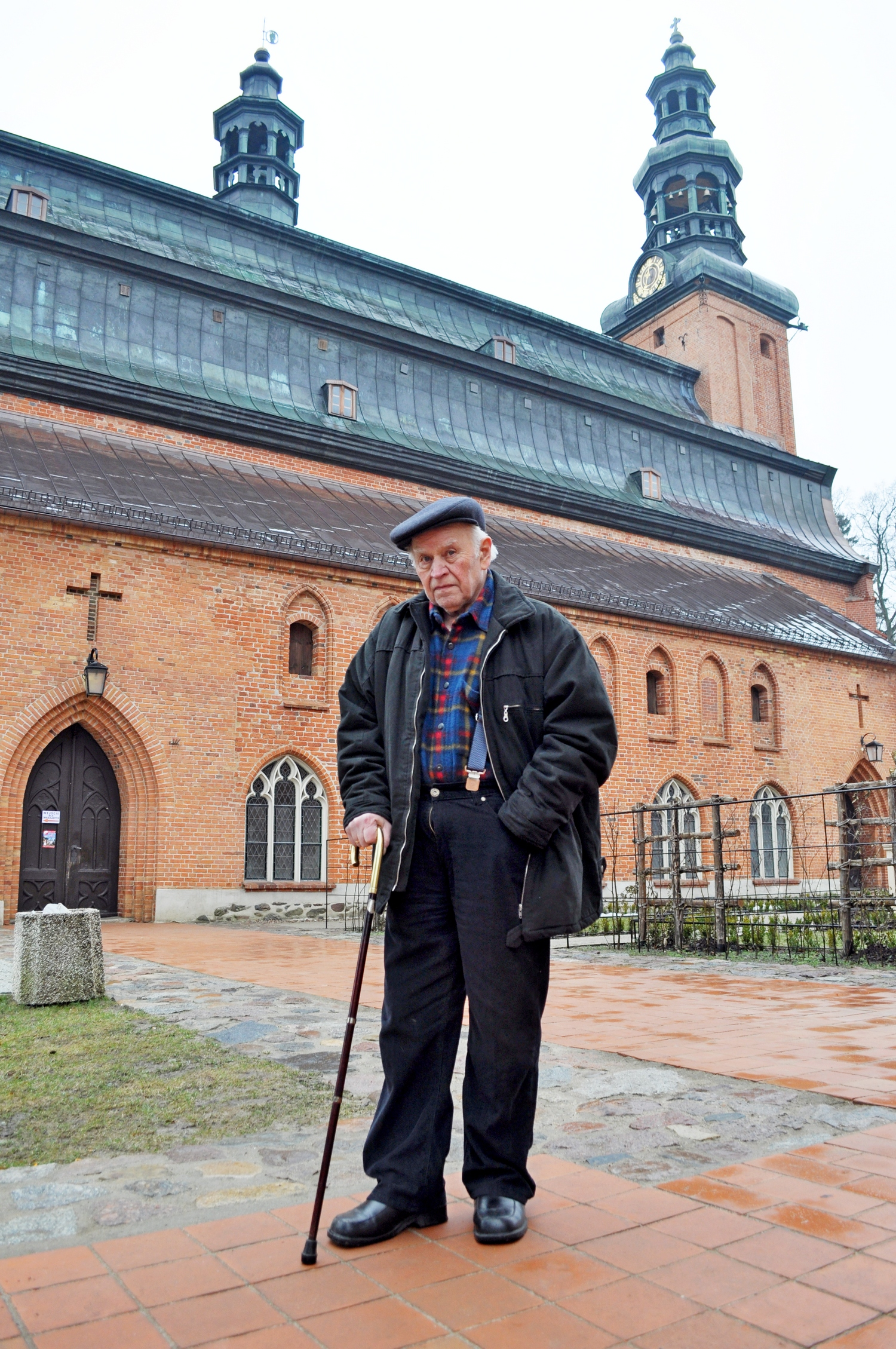 Zieliński Stanisław